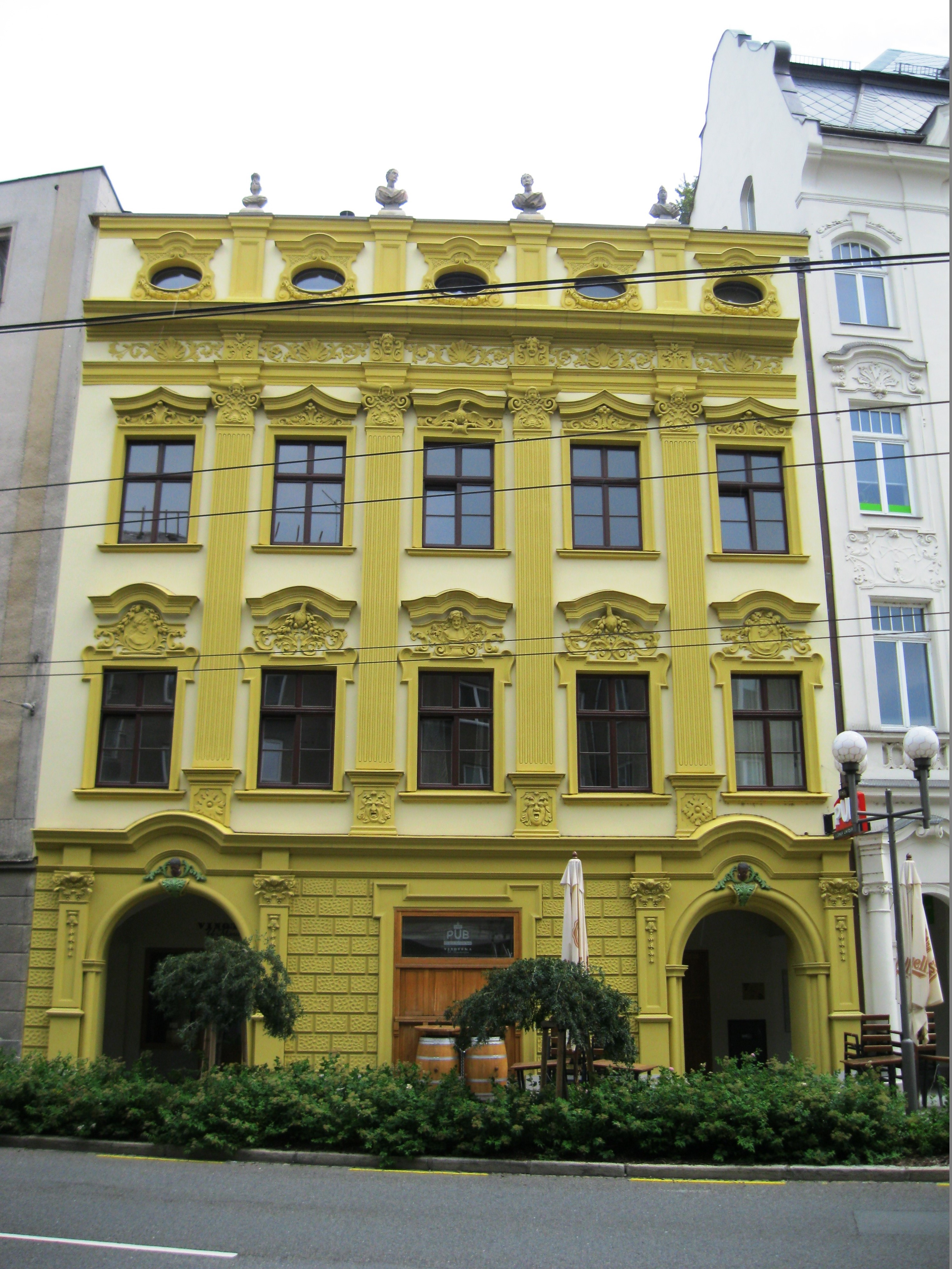 Měšťanský dům U mouřenína, Mezi Trhy 290/2, Opava-Město.